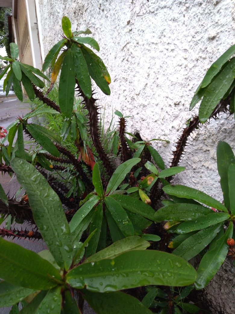 Essa imagem trata-se de uma espécie da família Euphorbiaceae, em que pode se observar a presença de acúleos no caule. É popularmente conhecida como coroa-de-cristo